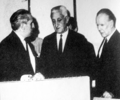 Es una foto del Presidente Arturo Illia junto al escritor argentino Jorge Luis Borges, en la Casa Rosada.